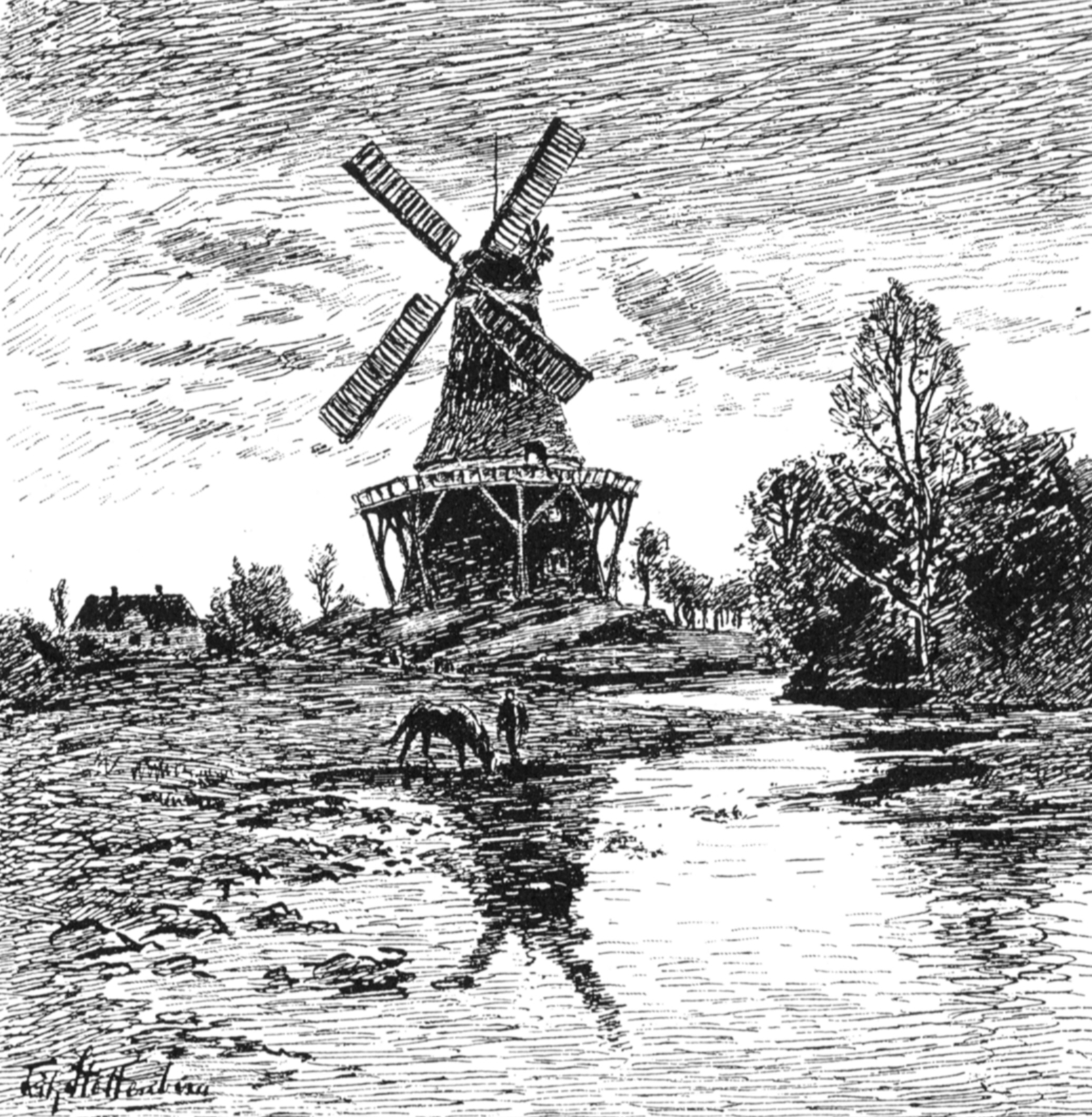 Windmühle bei Leck um 1895, Zeichnung von Fritz Stoltenberg.